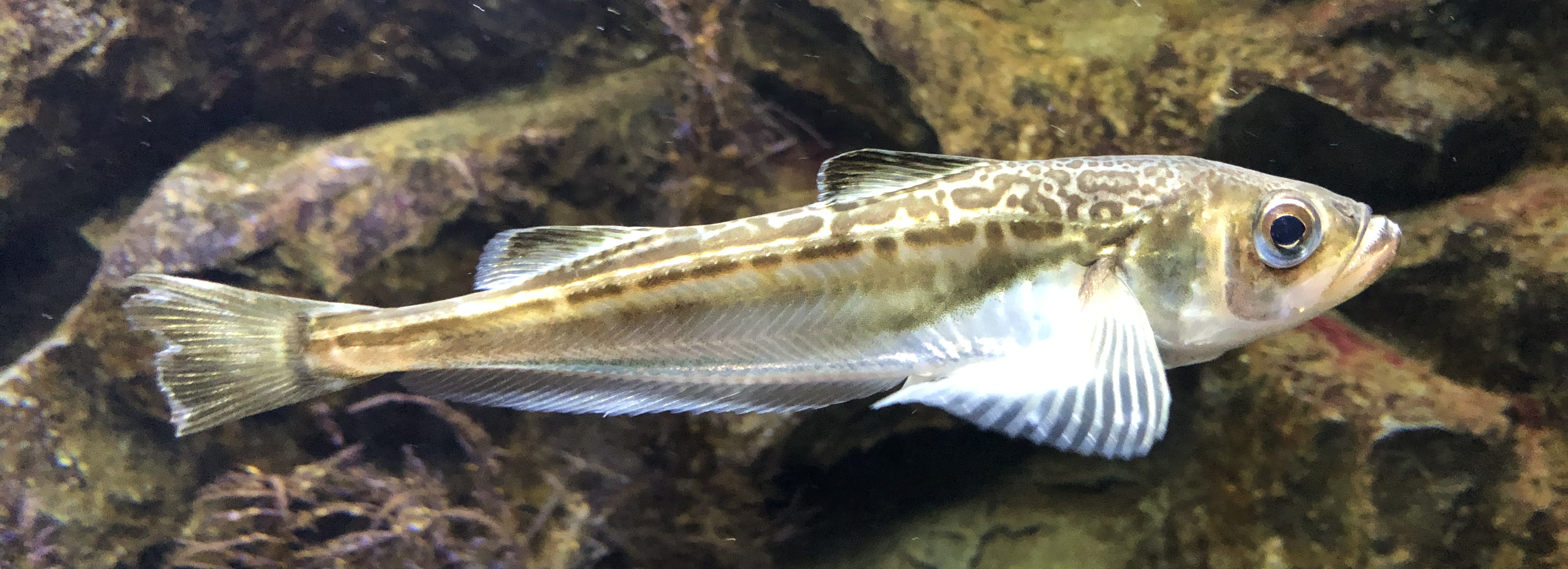 上越市立水族博物館飼育のja:ハタハタ